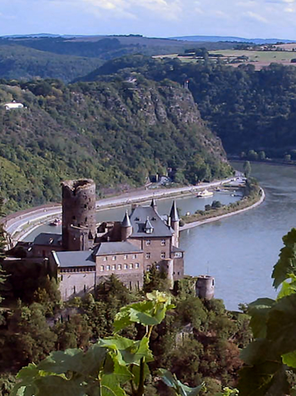 Burg Katz über dem Rhein mit Blick auf die Loreley.